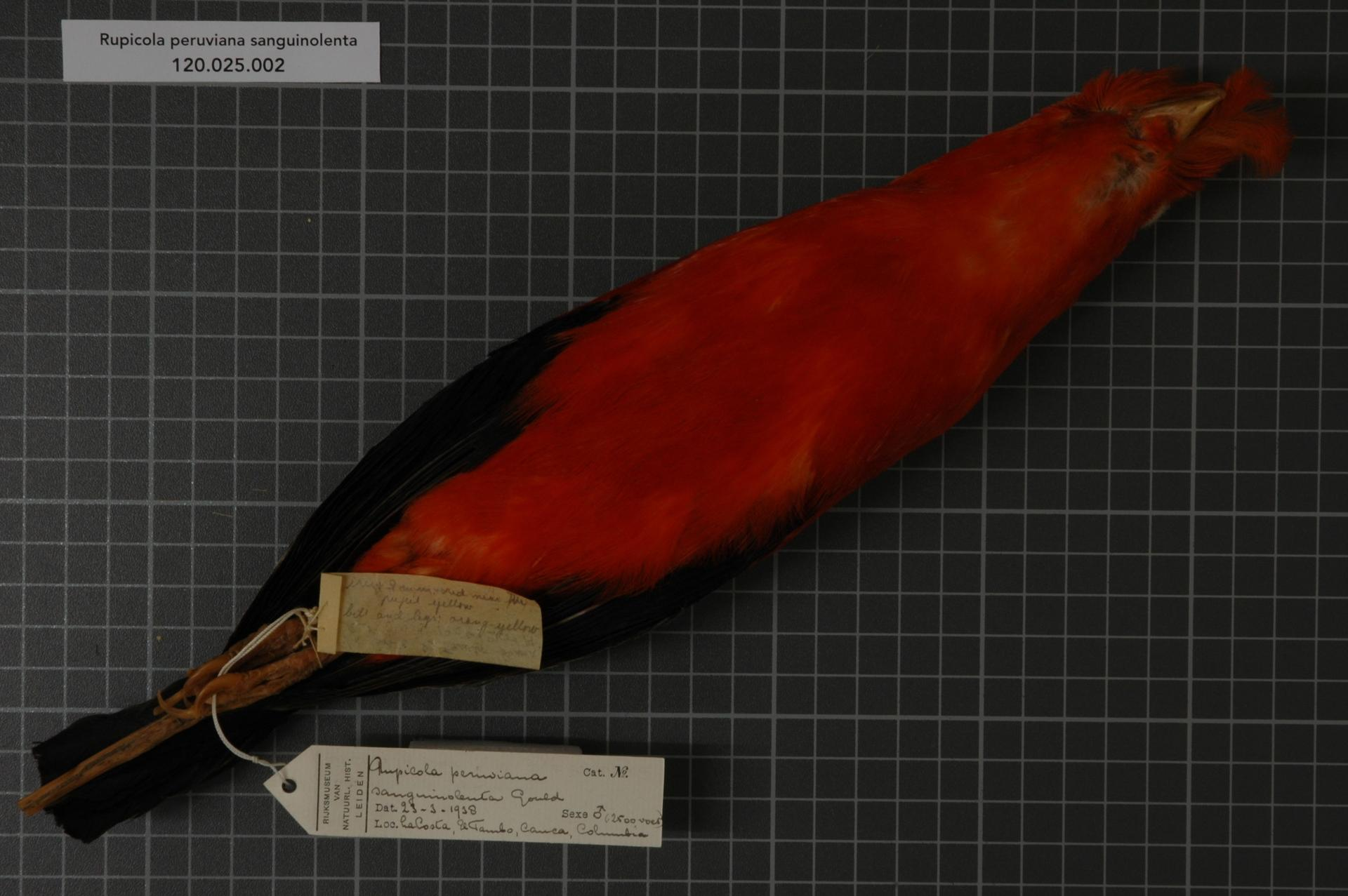 Rupicola peruviana sanguinolenta Gould, 1859